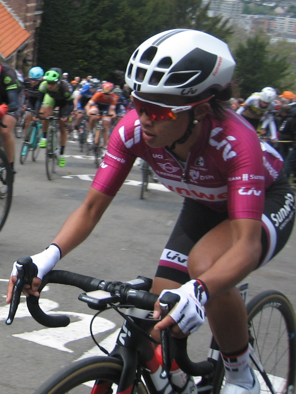 Coryn Rivera (Team Sunweb) in leiderstrui van Women's World Tour tijdens de eerste beklimming van de Muur van Hoei in de Waalse Pijl 2017